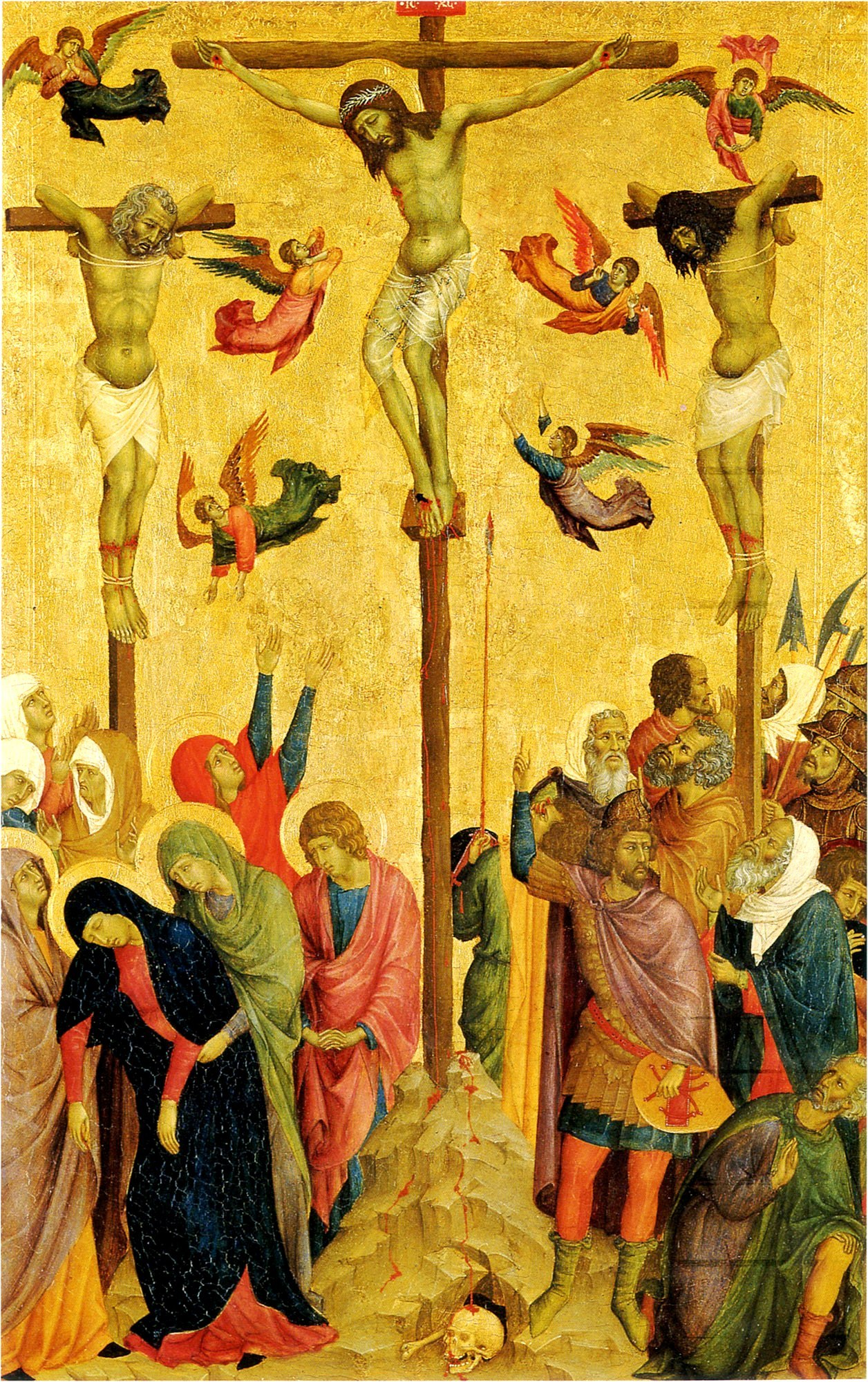 The-Cucifixion-157__Мастер_Читта_ди_Кастелло._Манчестер; Maestro di Citta di Castello